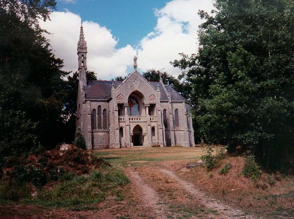 Chapelle Saint-Corentin, Plomodiern, Finistère, Bretagne .